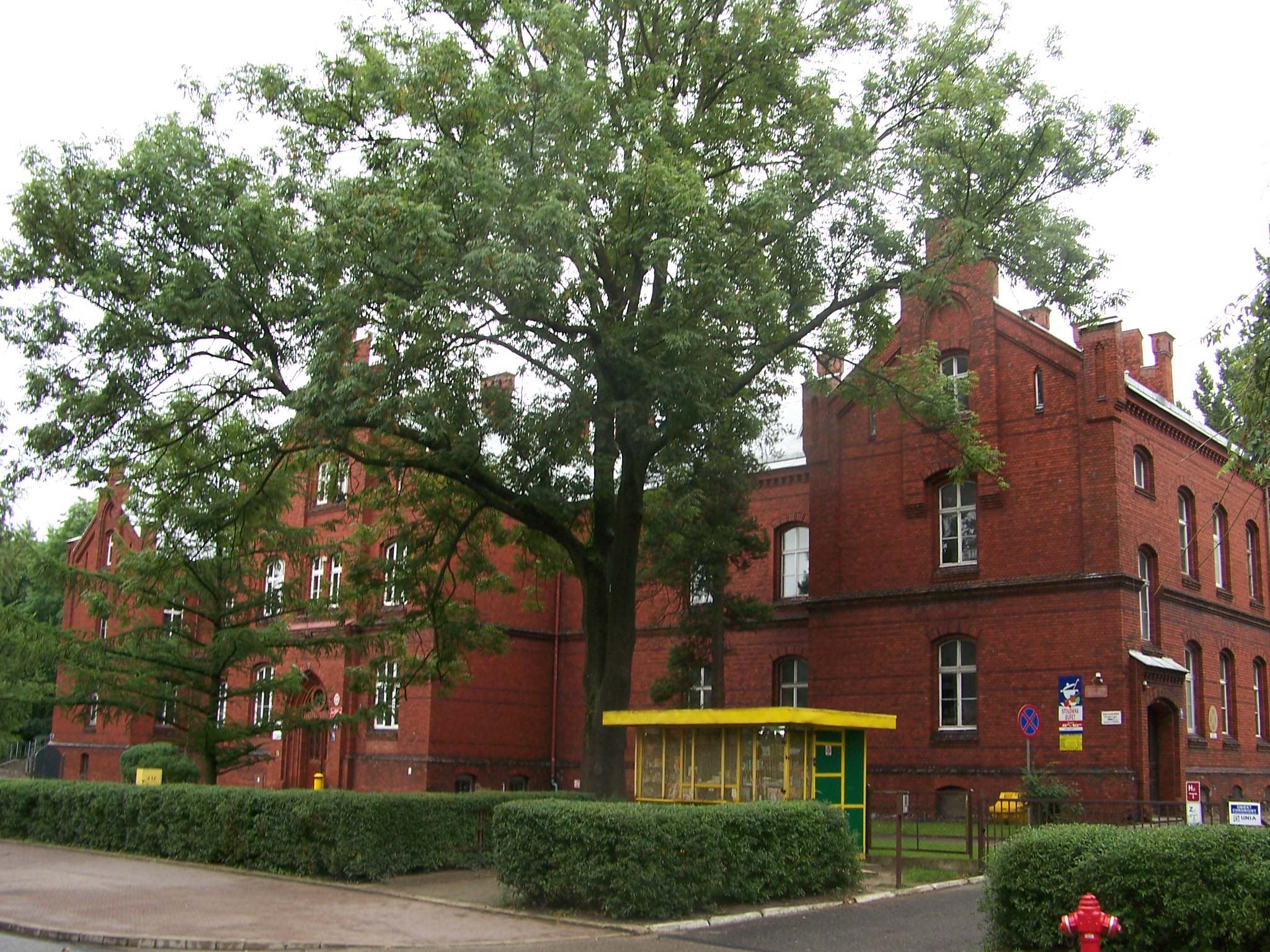 Budynek Poliklinki w Koszalinie, XIX w.